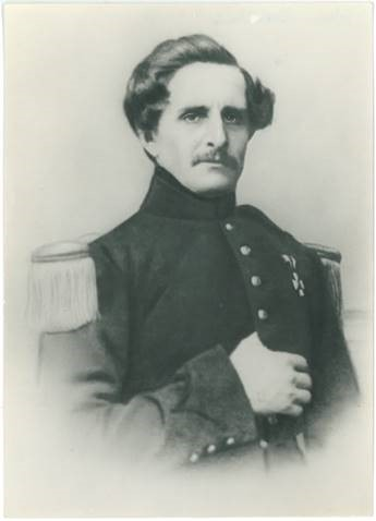 Photo Johan H.C. Basting, Daguerreotype photo, omstreeks 1860